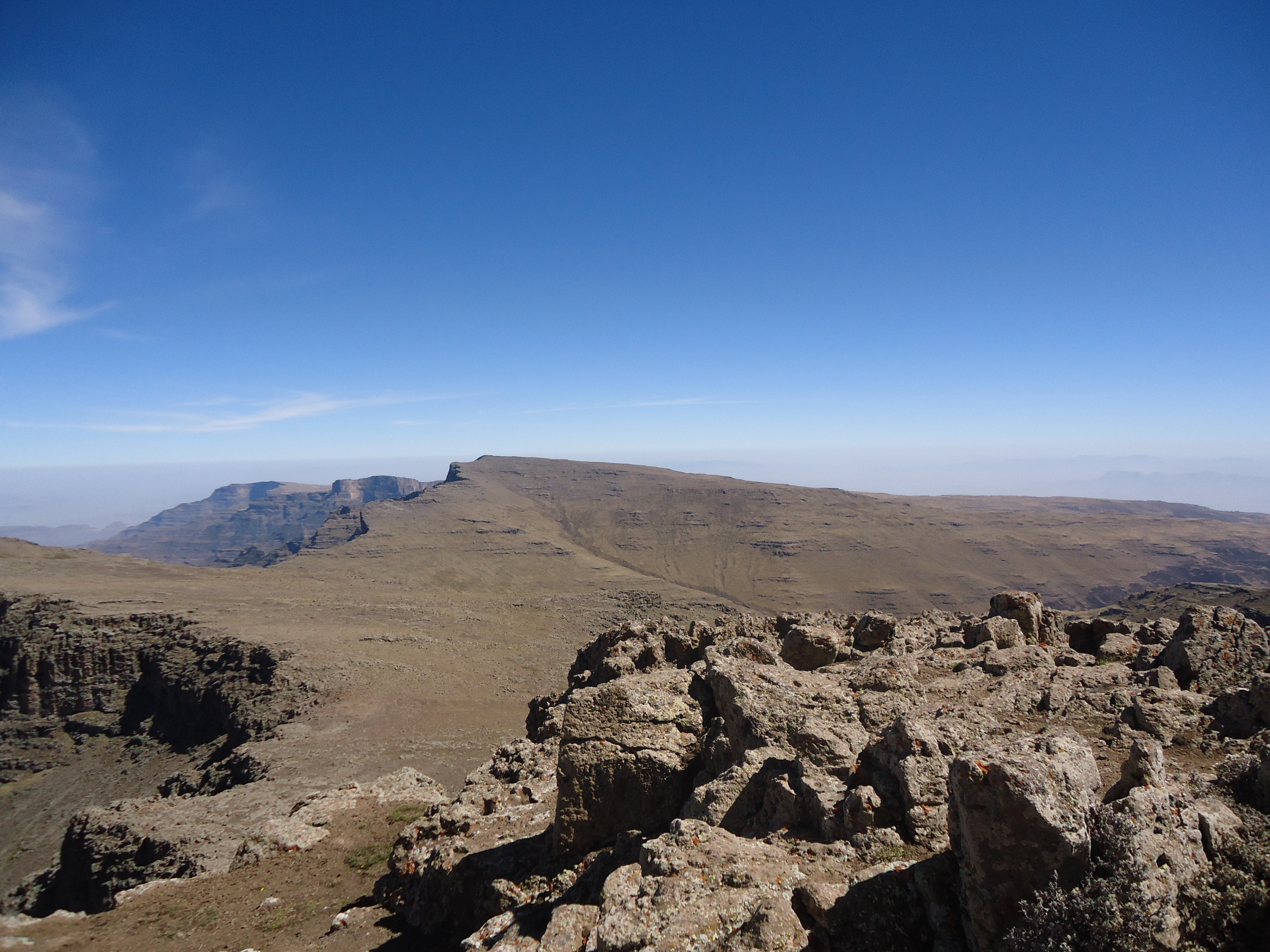 Blick in östliche Richtung